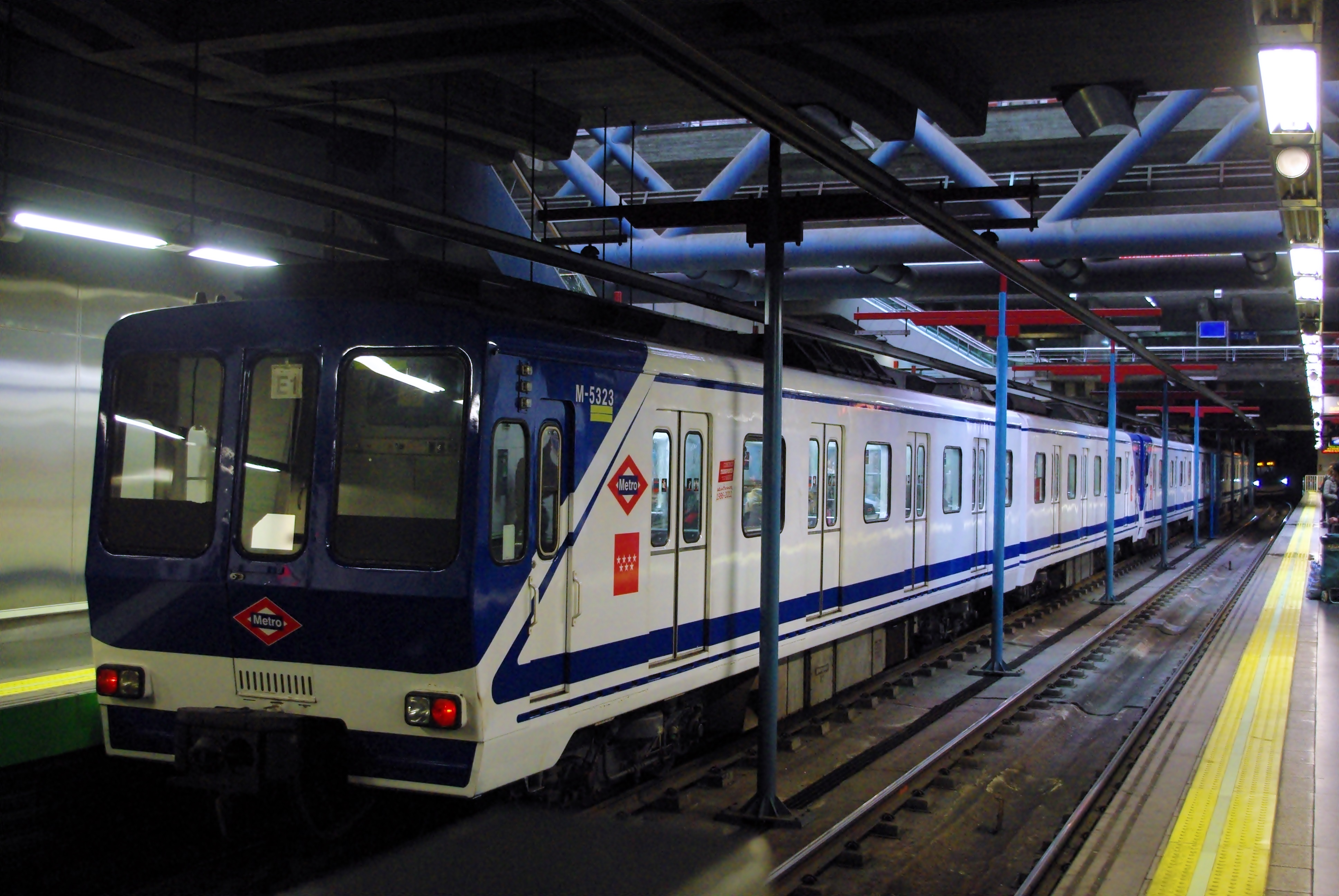 Con los 5000 originales retirados de servicio, aún aguantan por la línea 6 los 5200, y los 5500 por la circular y la 9. Para servidor que coge la línea gris todos los días, es una alegría verlos llegar, que sobreviven y aún no han sido retirados de servicio. Y mientras duren... En la foto tenemos a un 5200 en la estación de Príncipe Pío, donde la longitud del andén permite sacar una foto al tren una vez parado. Para más info sobre sobre la serie 5000 de Metro de Madrid